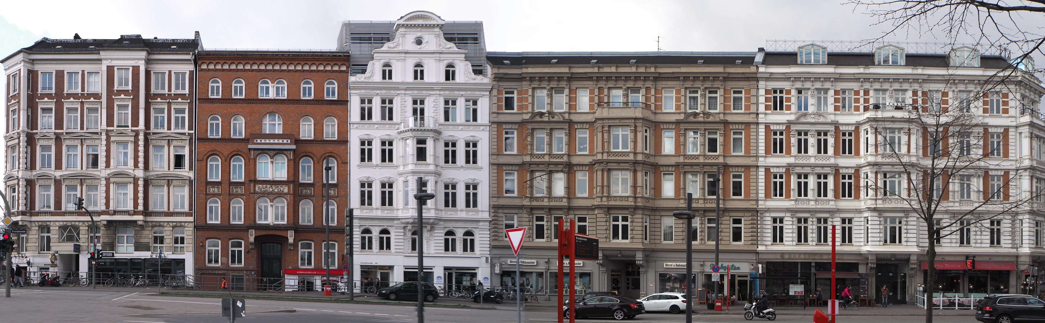 Hamburg-Altstadt, Brandstwiete, Altbauten nach Westen (gesamt), Foto: 2016